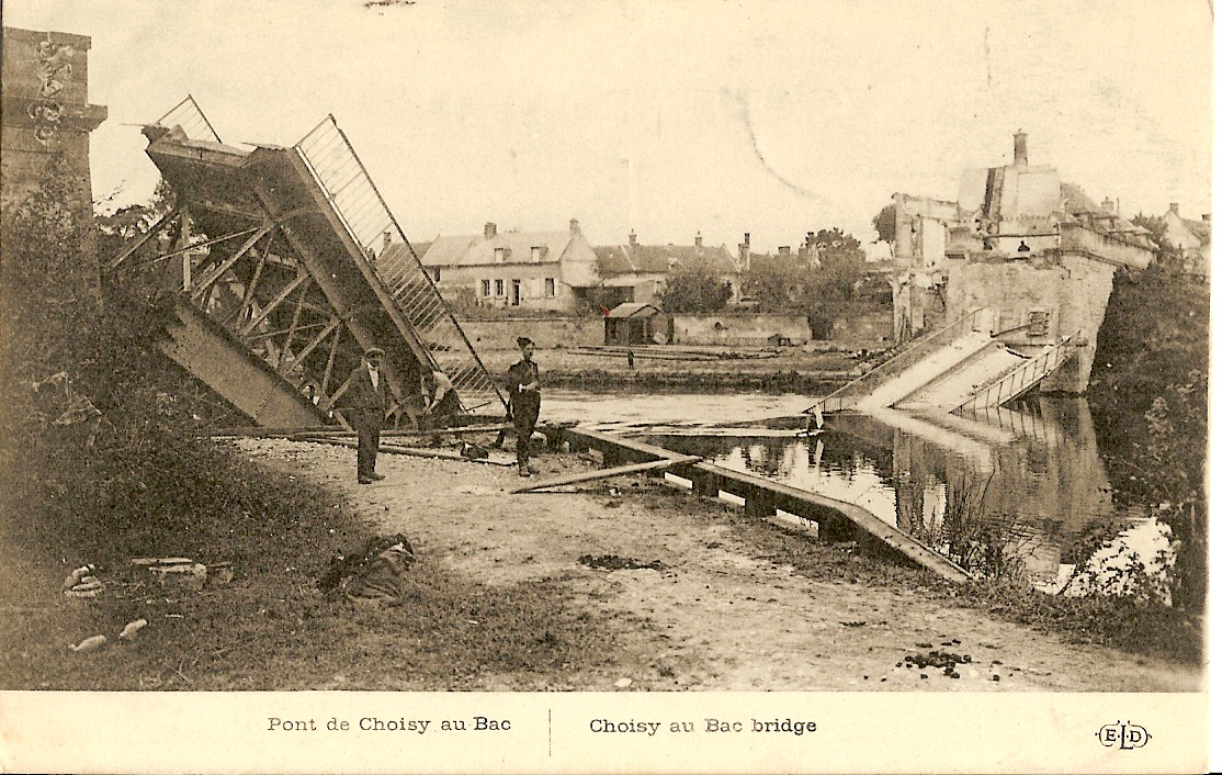 Choisy-au-Bac 1915. Die von den französischen Verteidigern des Ortes gesprengte Brücke.